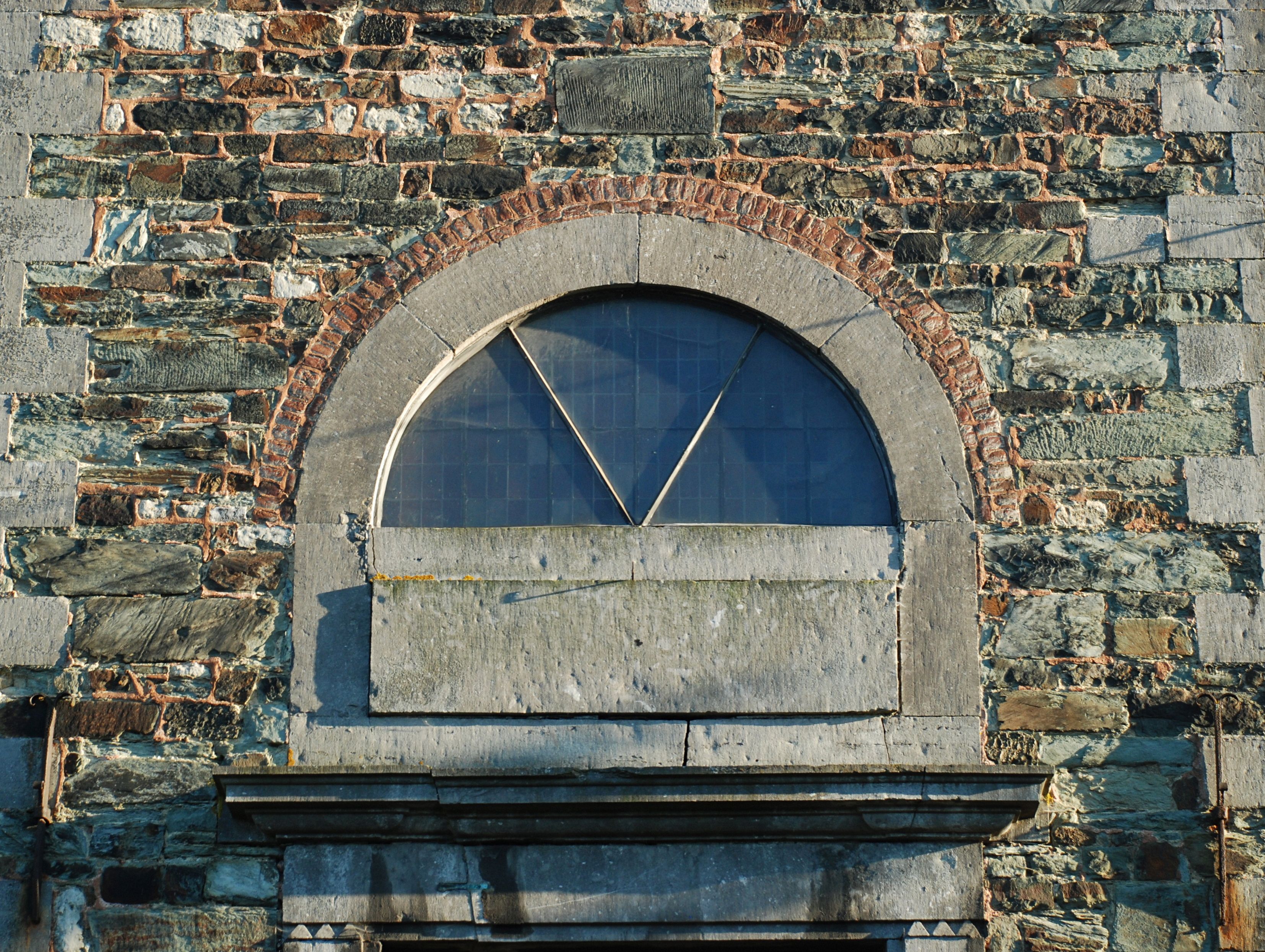 Belgique - Brabant wallon - Mont-Saint-Guibert - Église Saint-Guibert